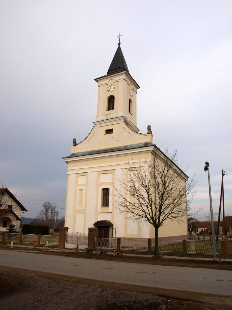 Crkva u Slobodnici, Brodsko-posavska županija.